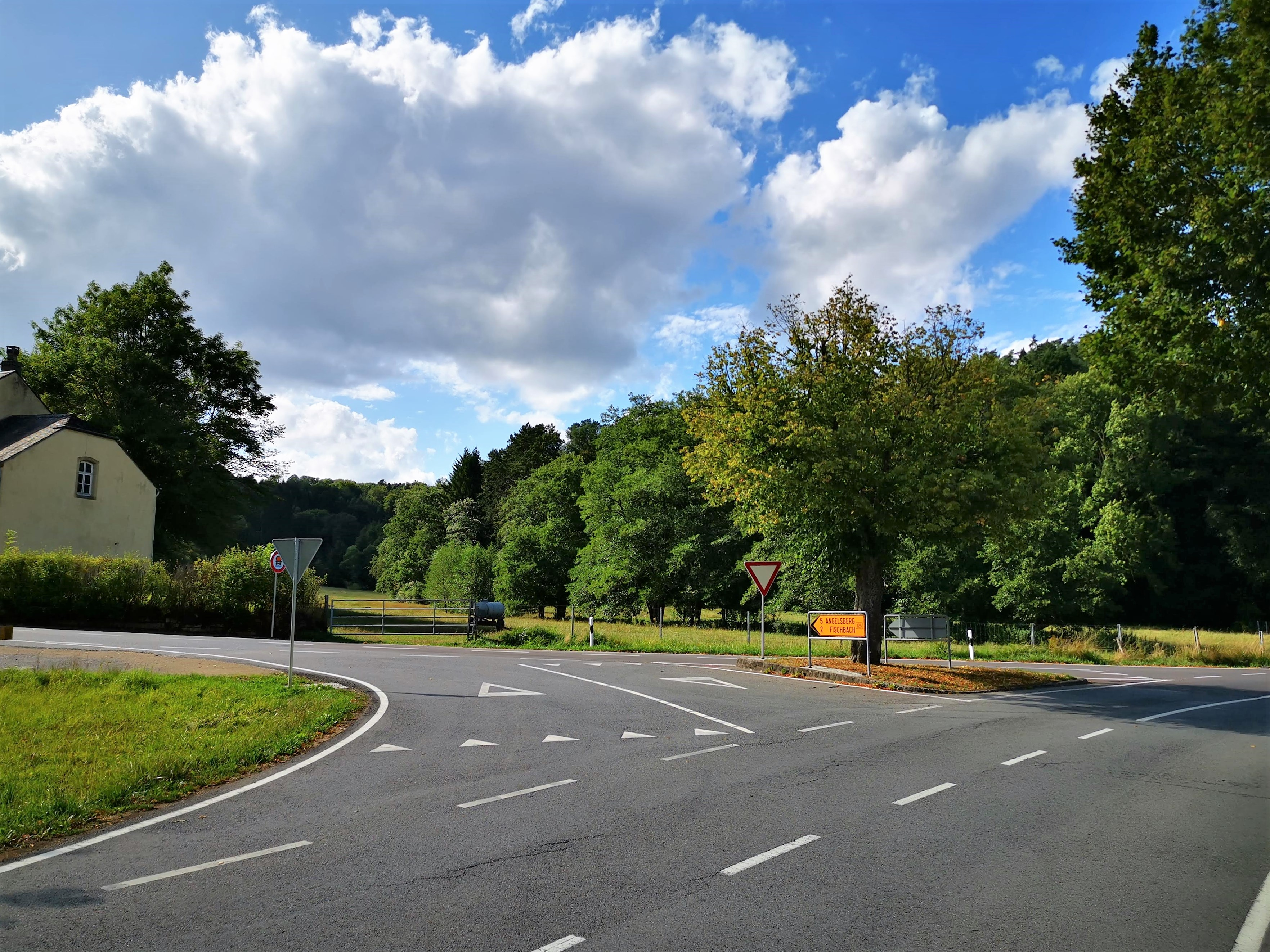 Commune de Fischbach, lieu-dit Schmëdd.